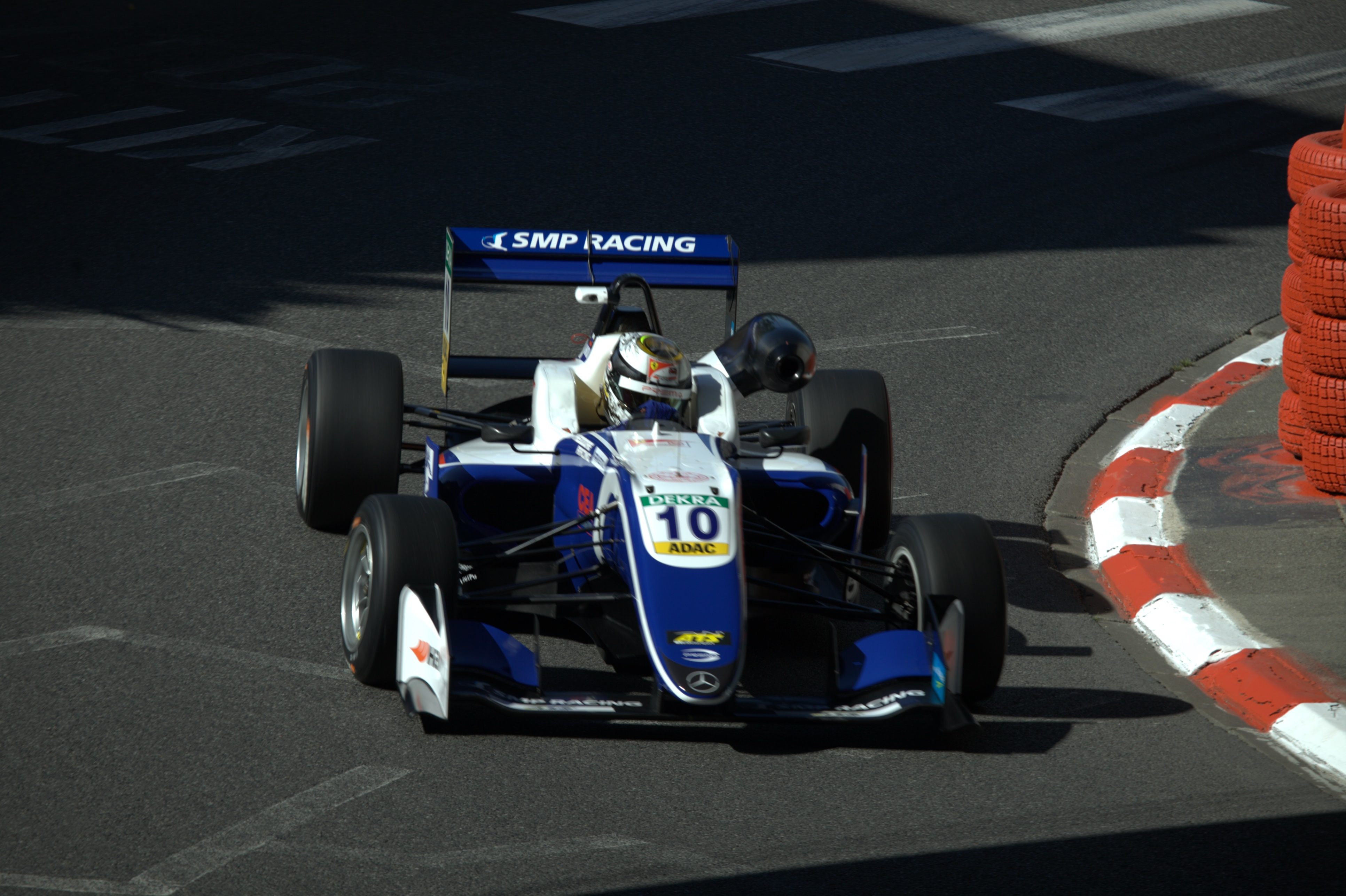 Роберт Шварцман (род. 1999) — российский автогонщик